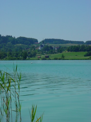 Taching am See über den Tachinger See